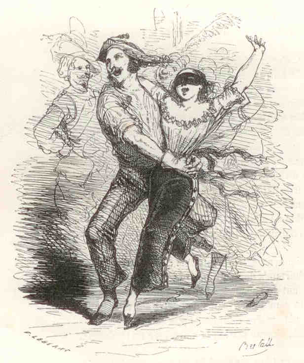 Couple de Parisiens en Carnaval, la femme en débardeur.